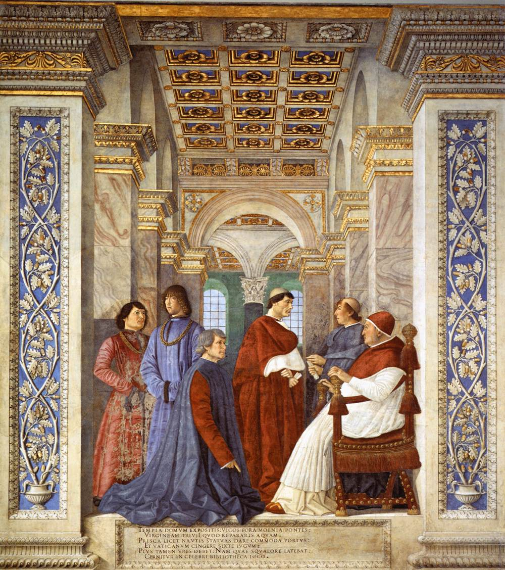 da sinistra, Giovanni della Rovere, Girolamo Riario, Bartolomeo Platina, later Julius II (Giuliano della Rovere), Raffaele Riario, tutti nipoti del papa, Sixtus IV